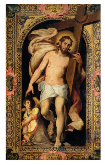 Cristo risorto, stendardo processionale conservato nella Pinacoteca di Parma.